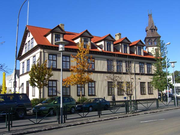 Lækjargata 14b í Reykjavík. Edda Gísladóttir tók myndina í sept.2006